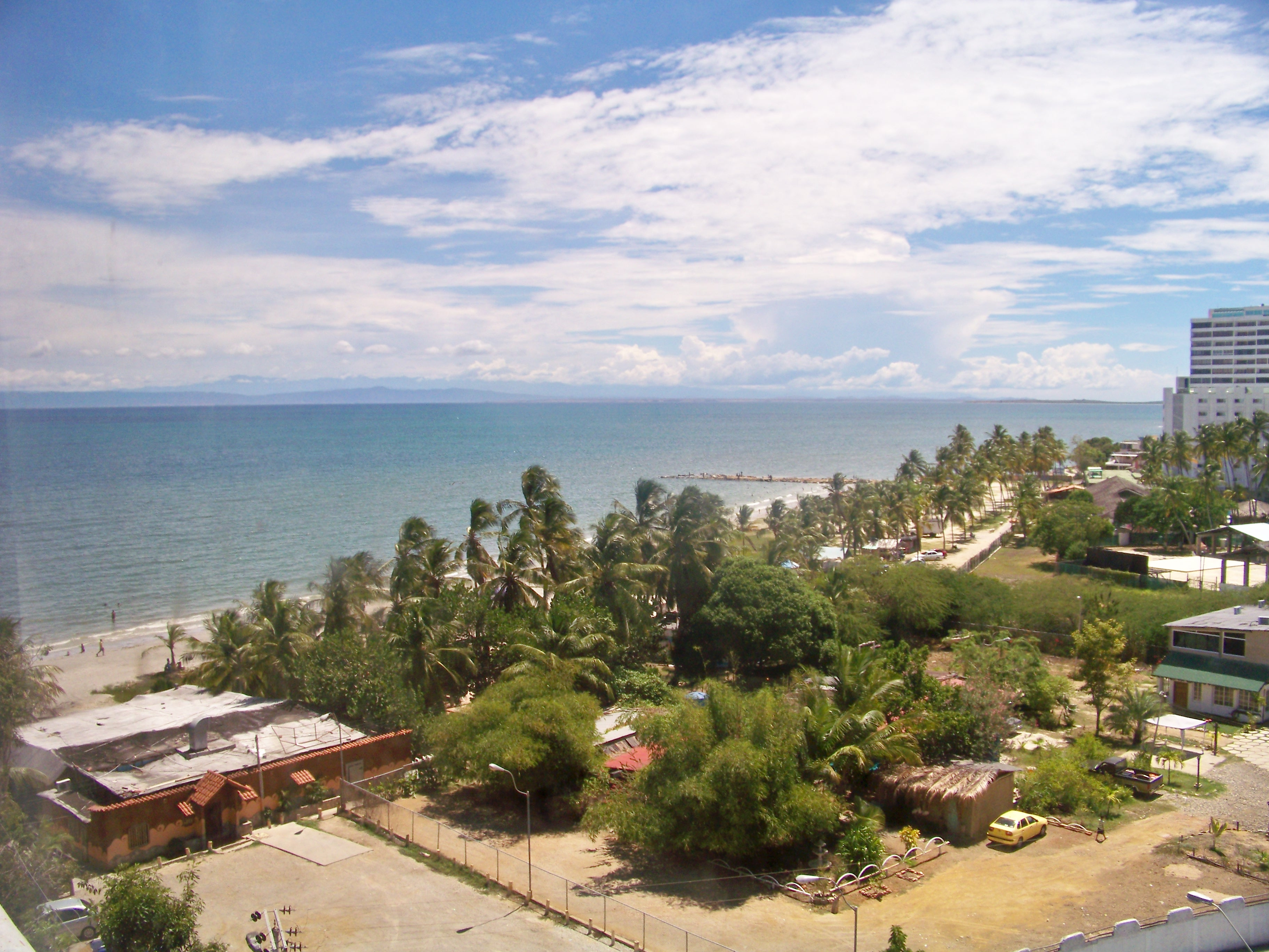 playa caribe en porlamar al fondo mar caribe